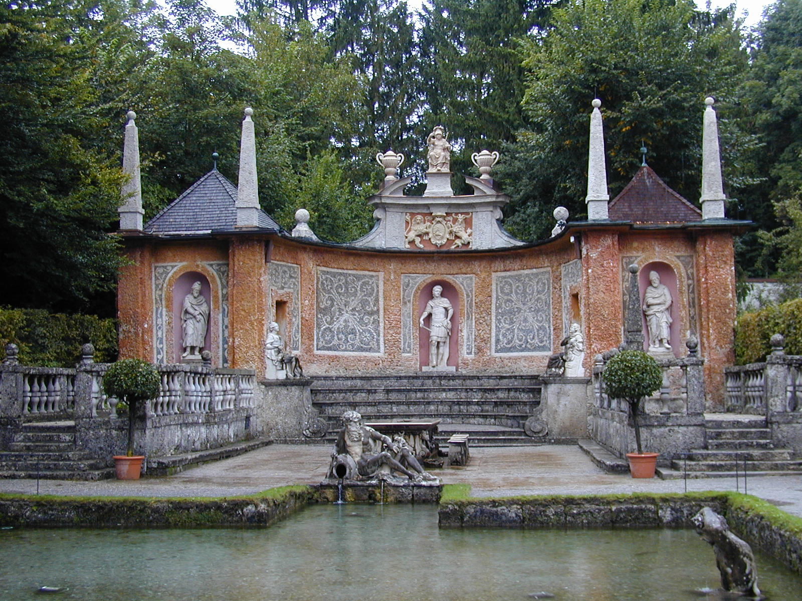 Fürstentisch des Fürsterzbischofs Markus Sitticus von Hohenems, errichtet 1613, Standort im Theatrum der Wasserspiele des Schlosses Hellbrunn, Salzburg